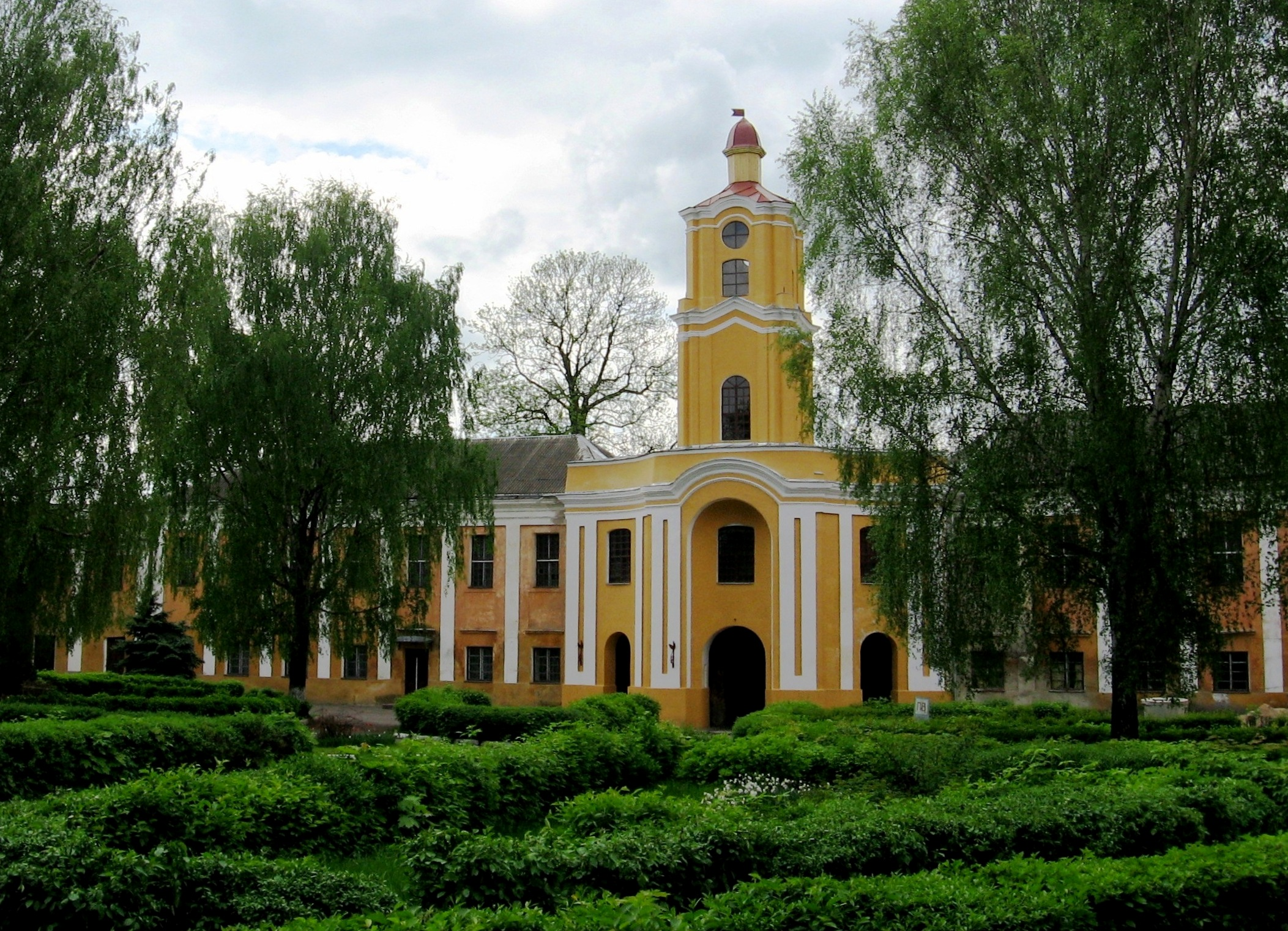 Олика. Вежа замку Радзивиллів